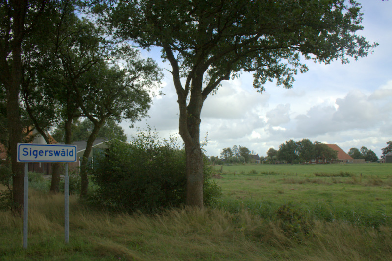 Een heel klein buurtschap in de Provincie Friesland. Maar je kunt het vinden, het heeft een plaatsnaambord.